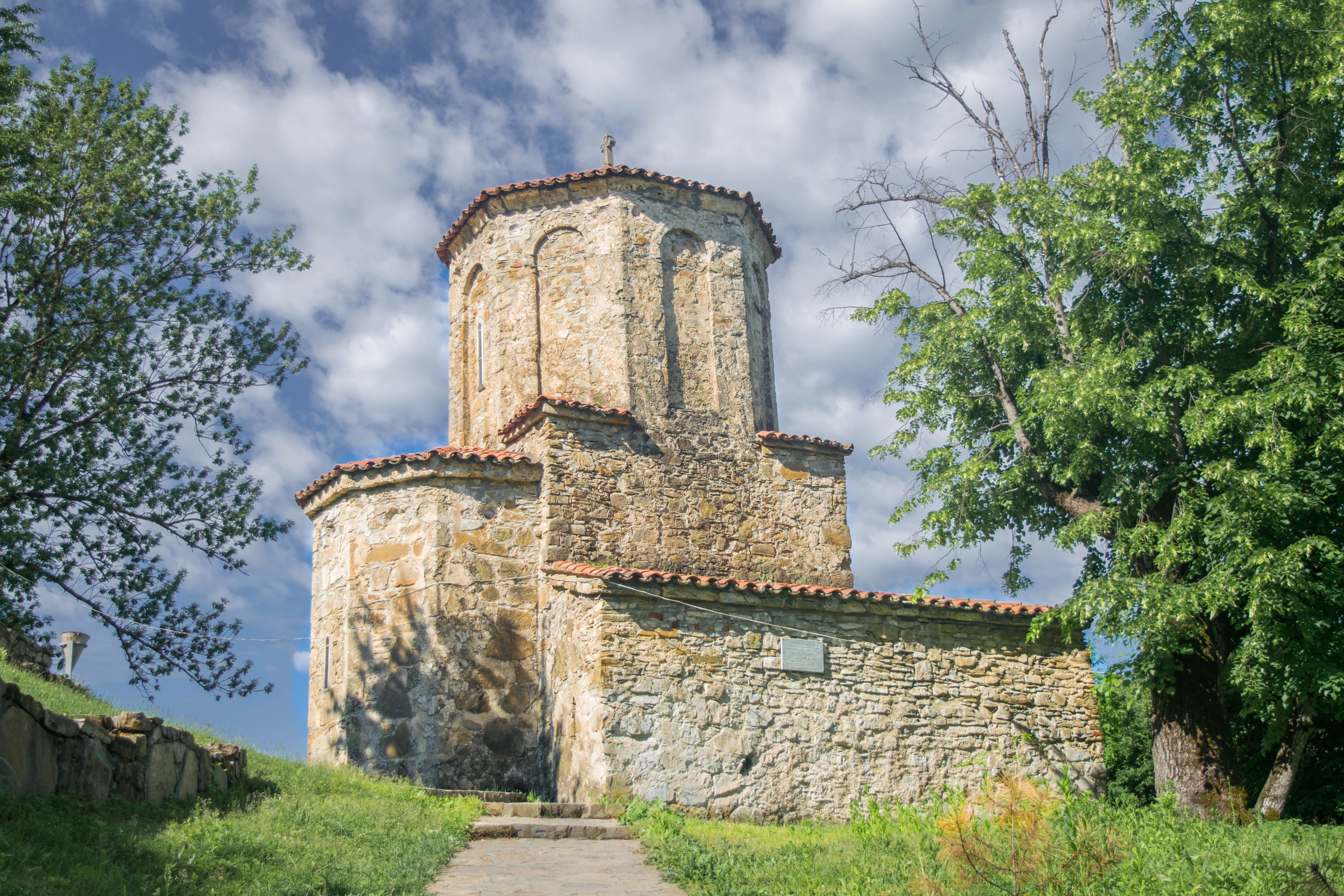 ნეკრესის გუმბათიანი ეკლესია